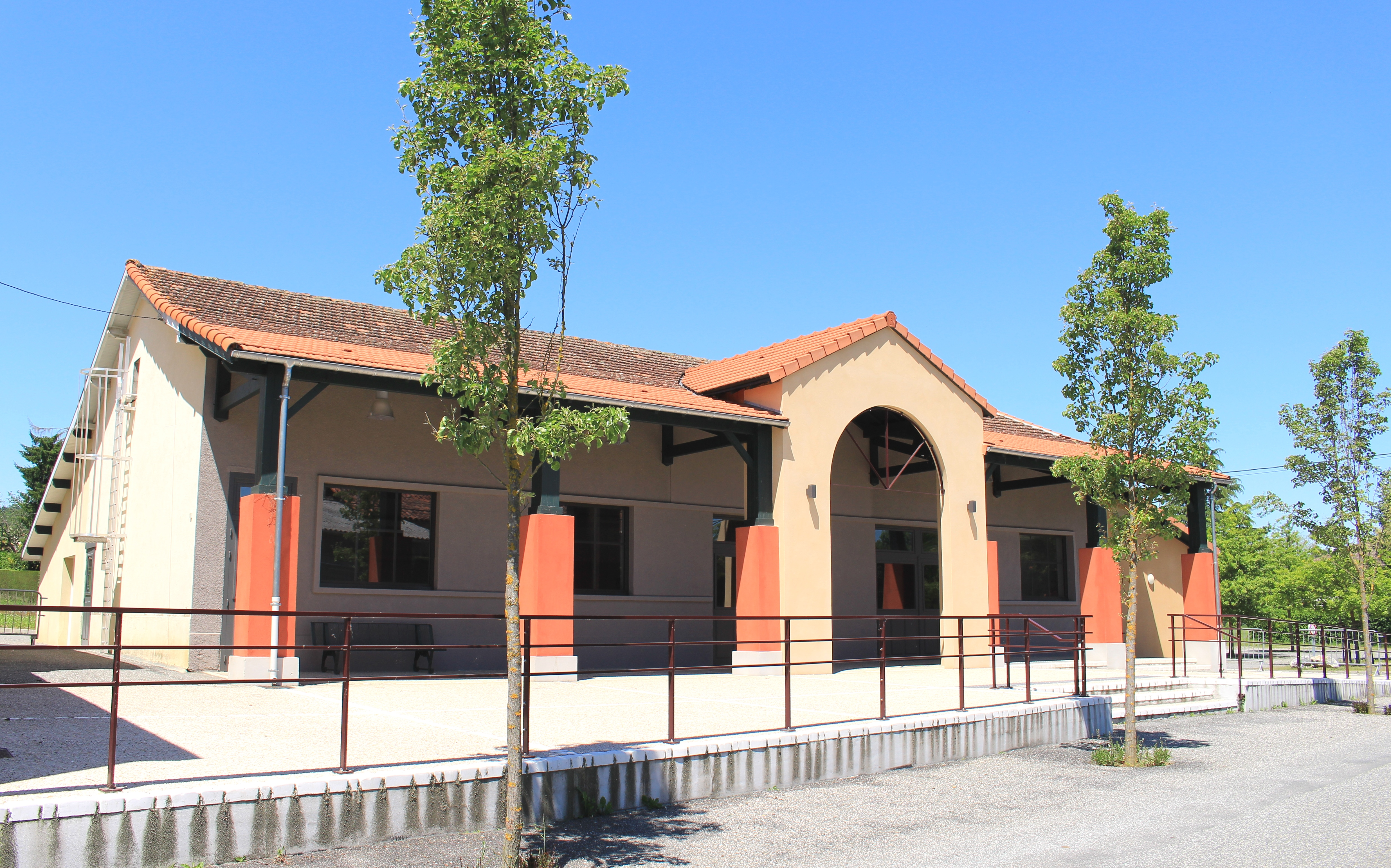 Salle des fêtes de Bonnefont (Hautes-Pyrénées)